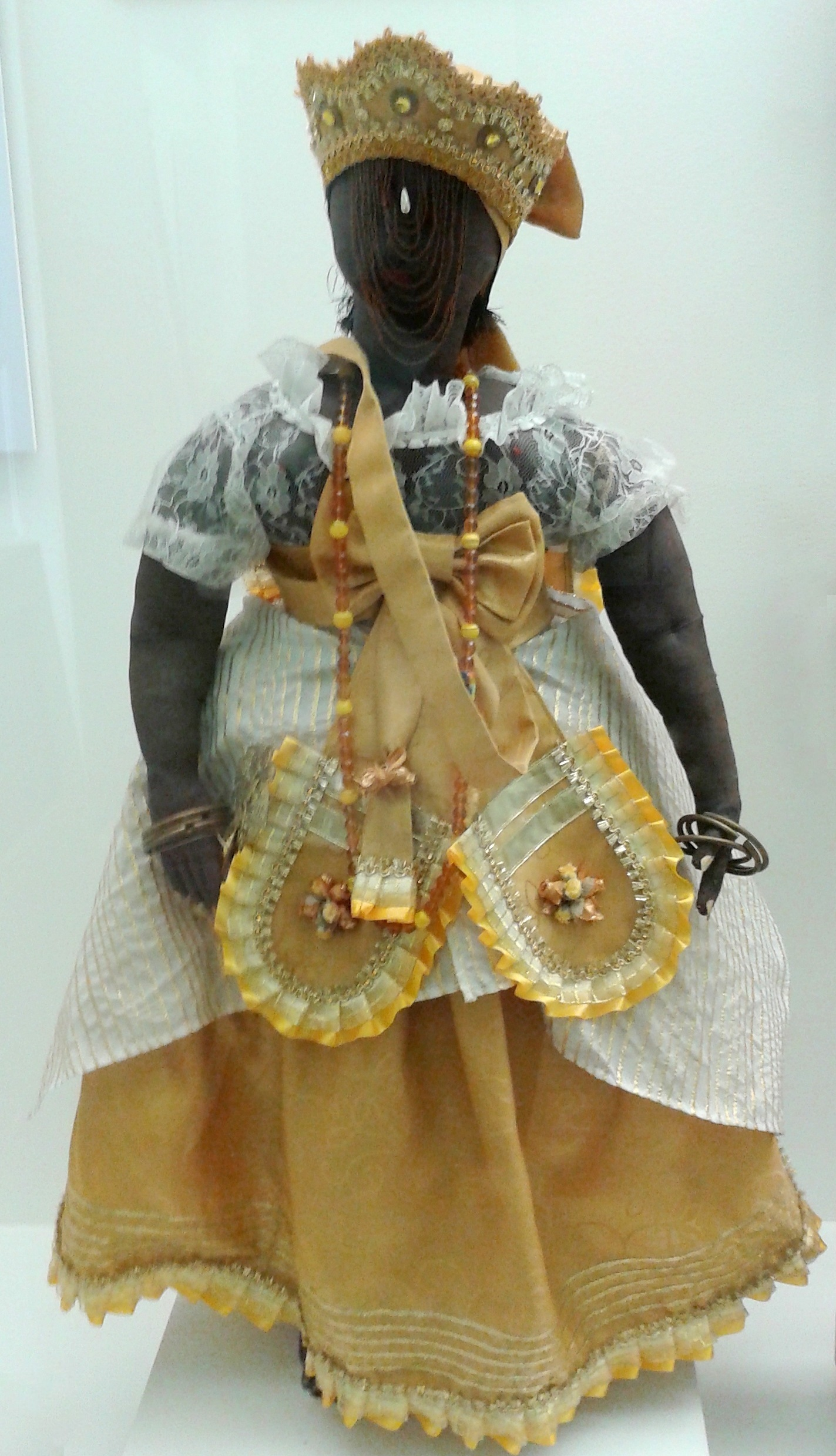 Português do Brasil: Boneca de pano. Dimensões: 1,08 x 54,00 cm . Descrição: Boneca de pano feita para apoio da Exposição de Etnologia Regional, inaugurada em 1949. As bonecas daquela mostra foram encomendadas para serem vestidas com trajes de orixás. O traje desta boneca foi confeccionado em 2005, por Nilsom Augusto dos Santos, para a exposição temporária de lançamento do disco compacto Ilê Omulu Oxum. Museu Nacional da UFRJ, no Rio de Janeiro.